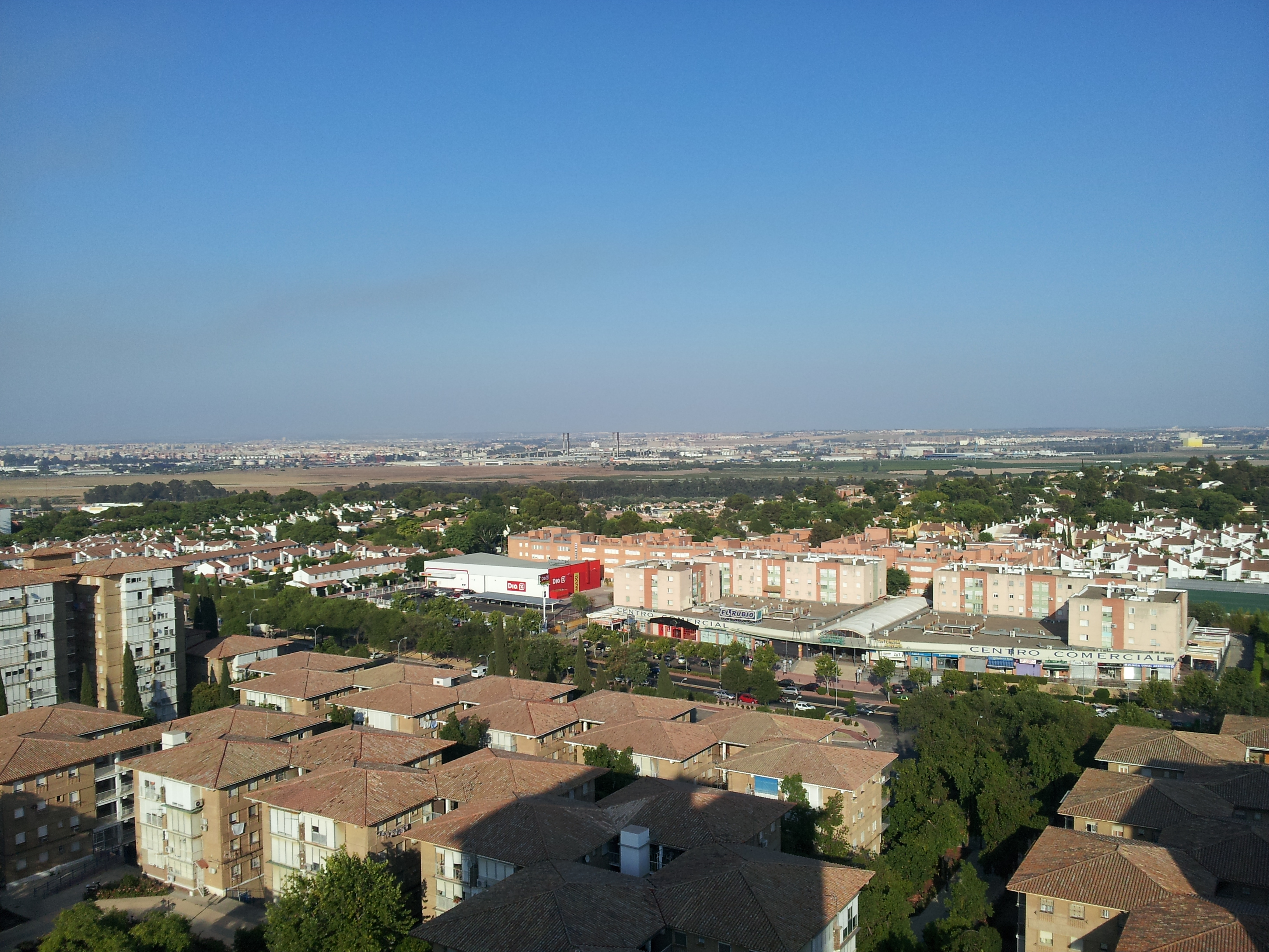 Urbanizaciones Ciudad Aljarafe y Simón Verde de Mairena del Aljarafe, fotografiadas desde la planta 15 del conjunto 16 de Ciudad Aljarafe